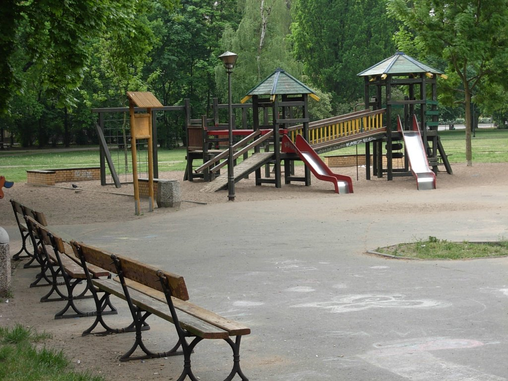 W parku im. Jana Kochanowskiego w Bydgoszczy